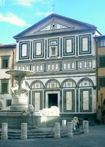 Empoli - La collegiata di S. Andrea e la fontana del Pampaloni Foto scattata in luogo pubblico da Franztanz il 7 novembre 2004 e rilasciata a Wikipedia sotto GFDL. Franztanz 23:52, Dic 12, 2004 (UTC)